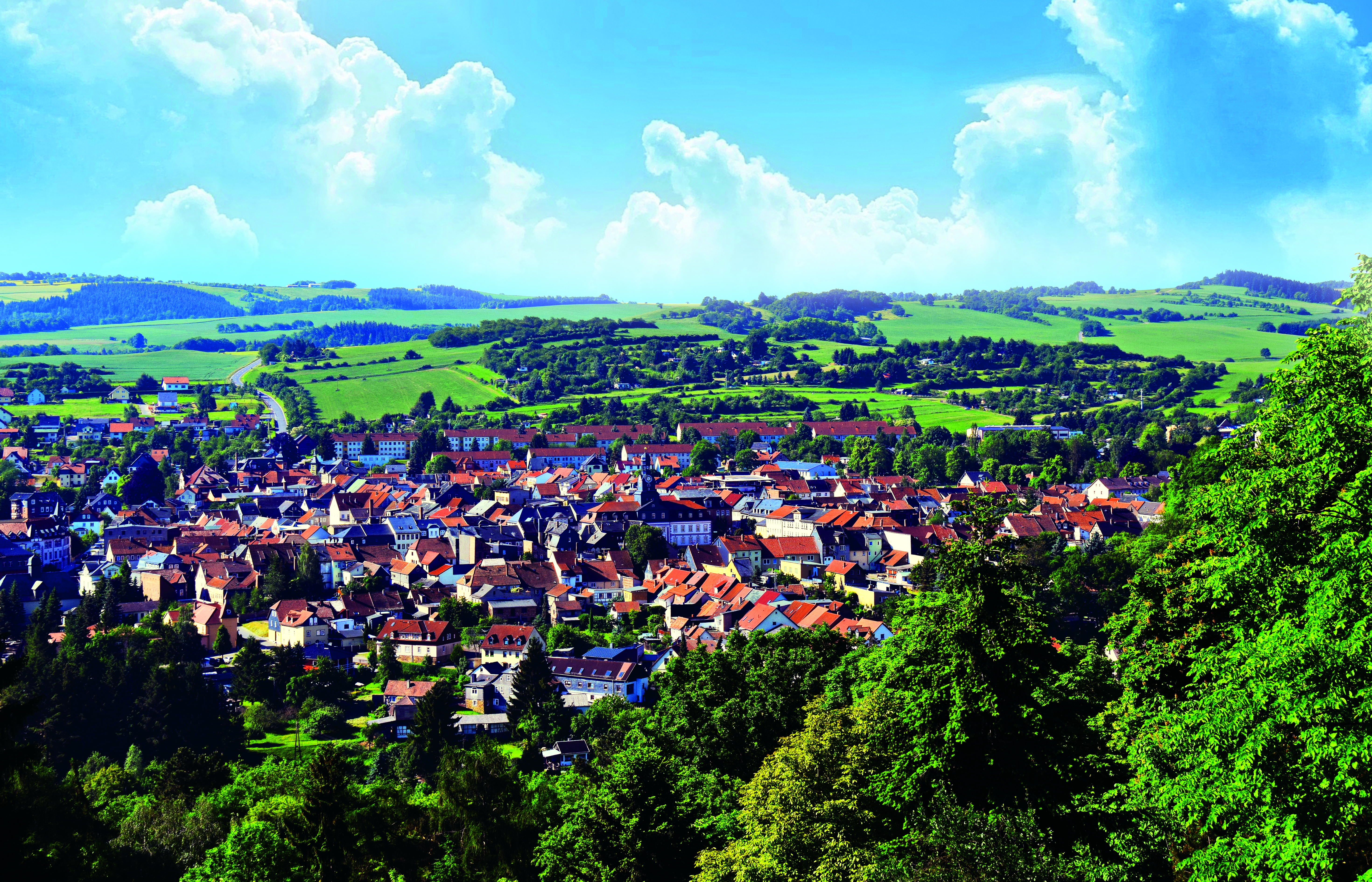 Blick vom Mühlberg ("Canapeé") auf den Stadtkern und das Rathaus von Königsee.